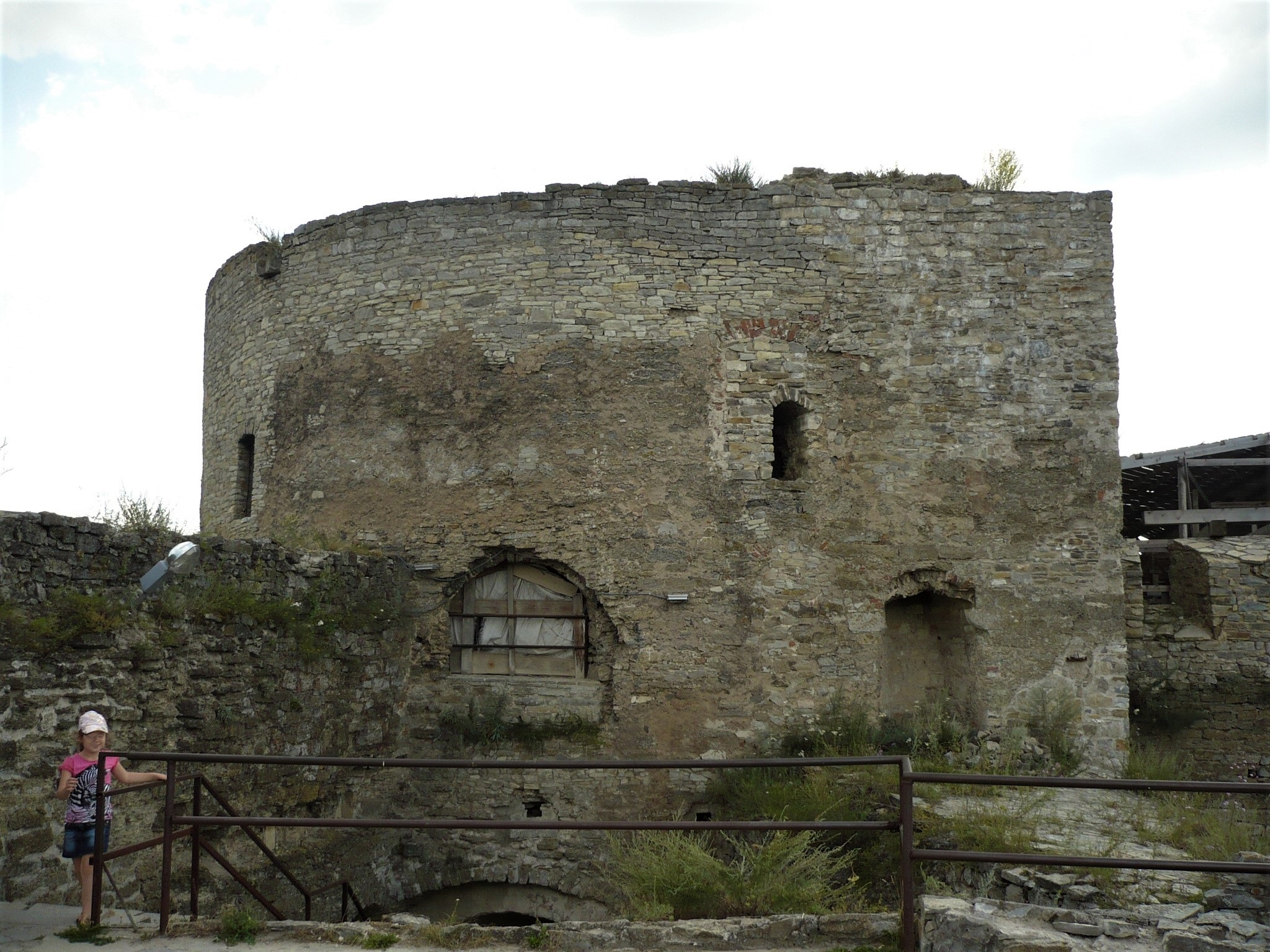 Twierdza w Kamieńcu Podolskim. Baszta Denna